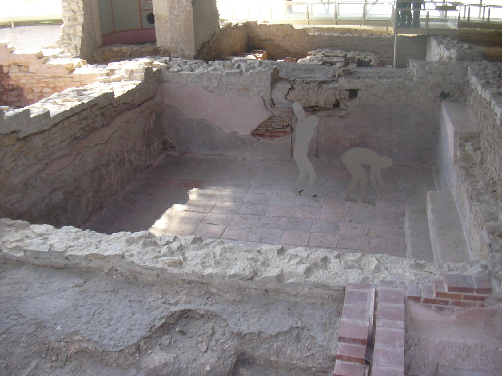 Weißenburg, Roman Bath, big frigidaium, Bavaria/Germany